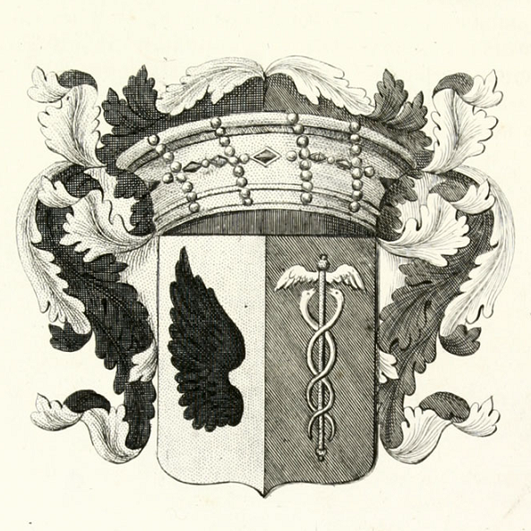 Герб рода Баронов Фридриксов